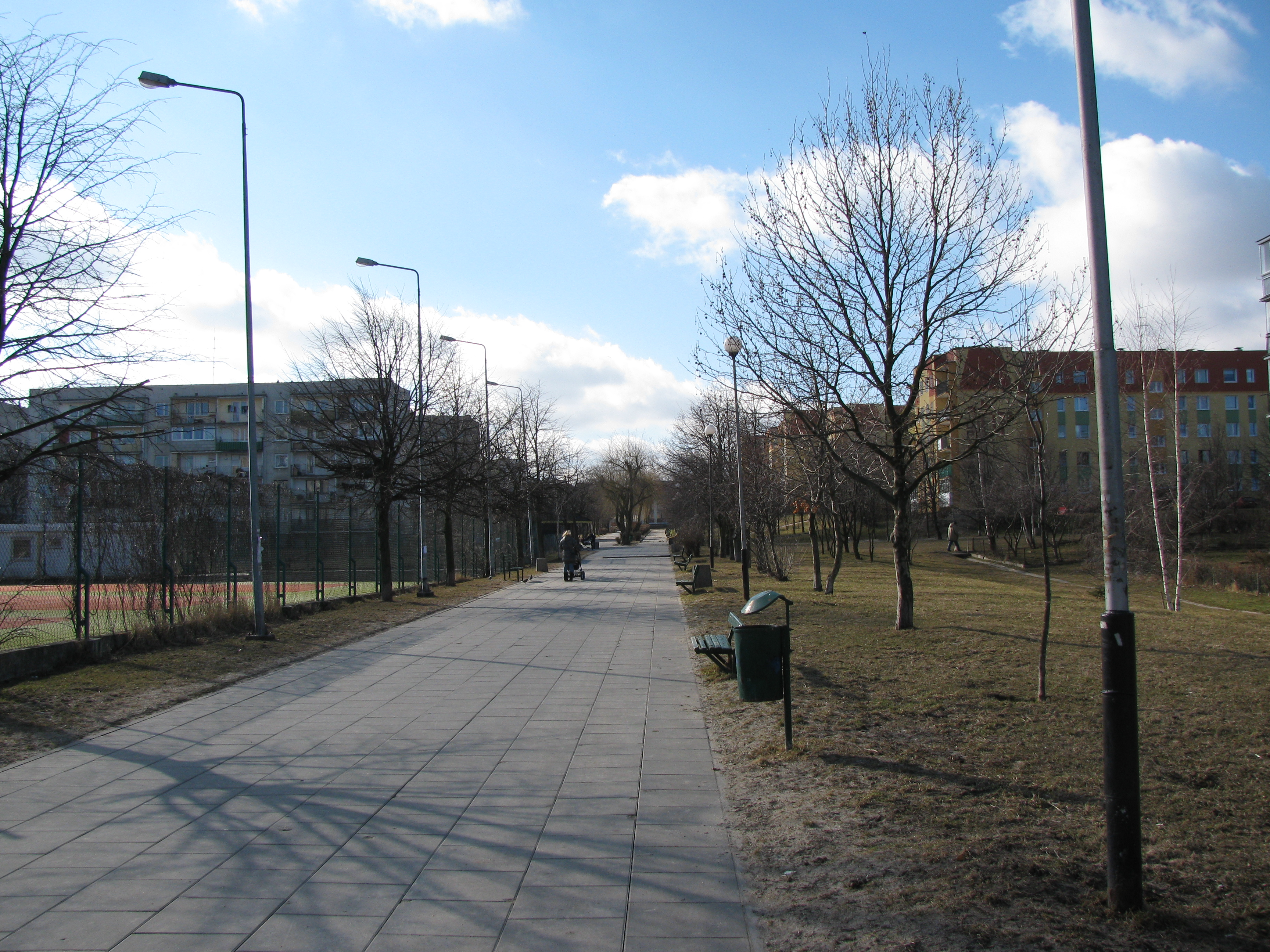 Deptak na osiedlu Gdańsk Chełm. Po lewej bloki ul. Witosa, po prawej bloki ul. Dragana.